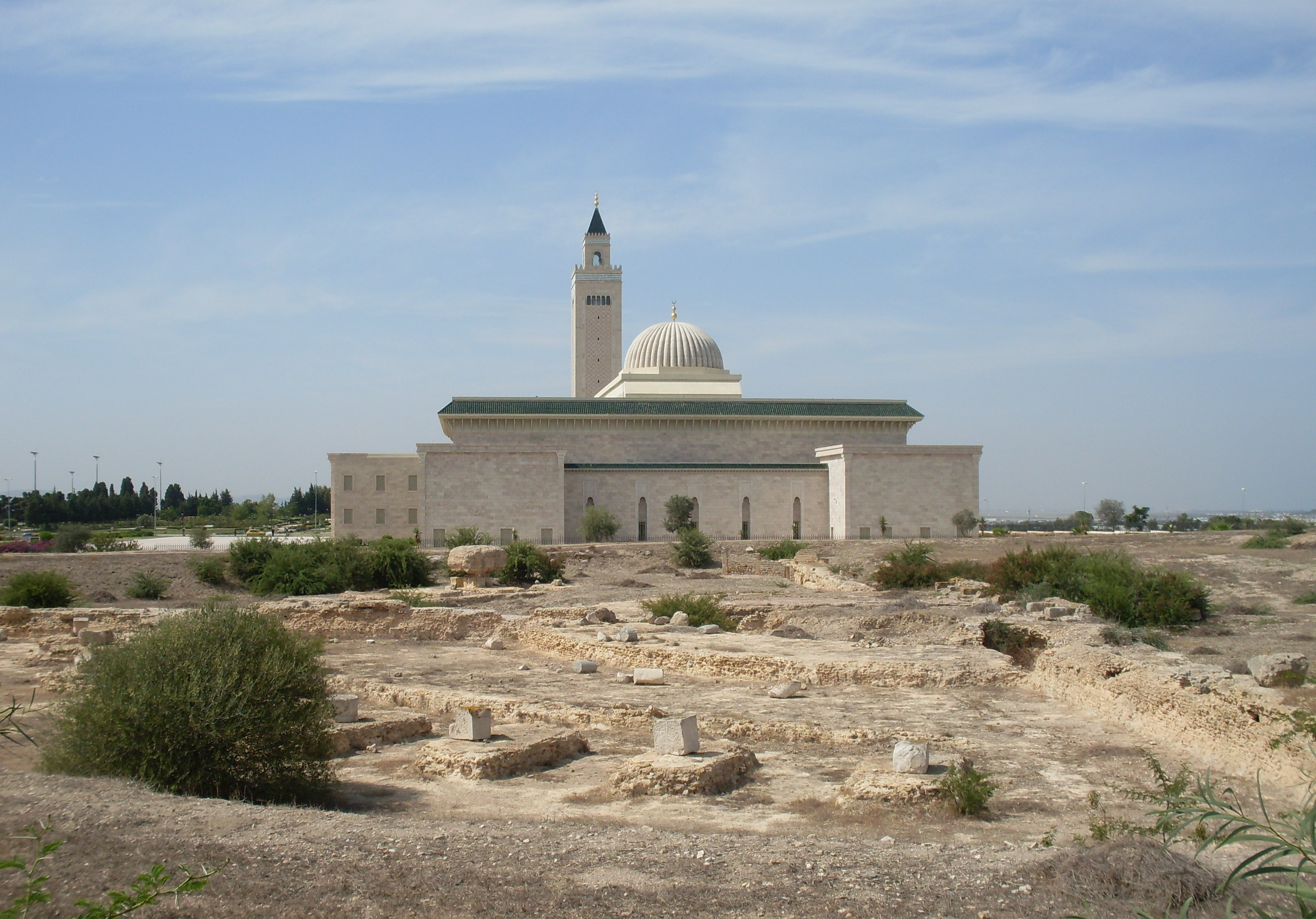 Tunis, odéon de Carthage